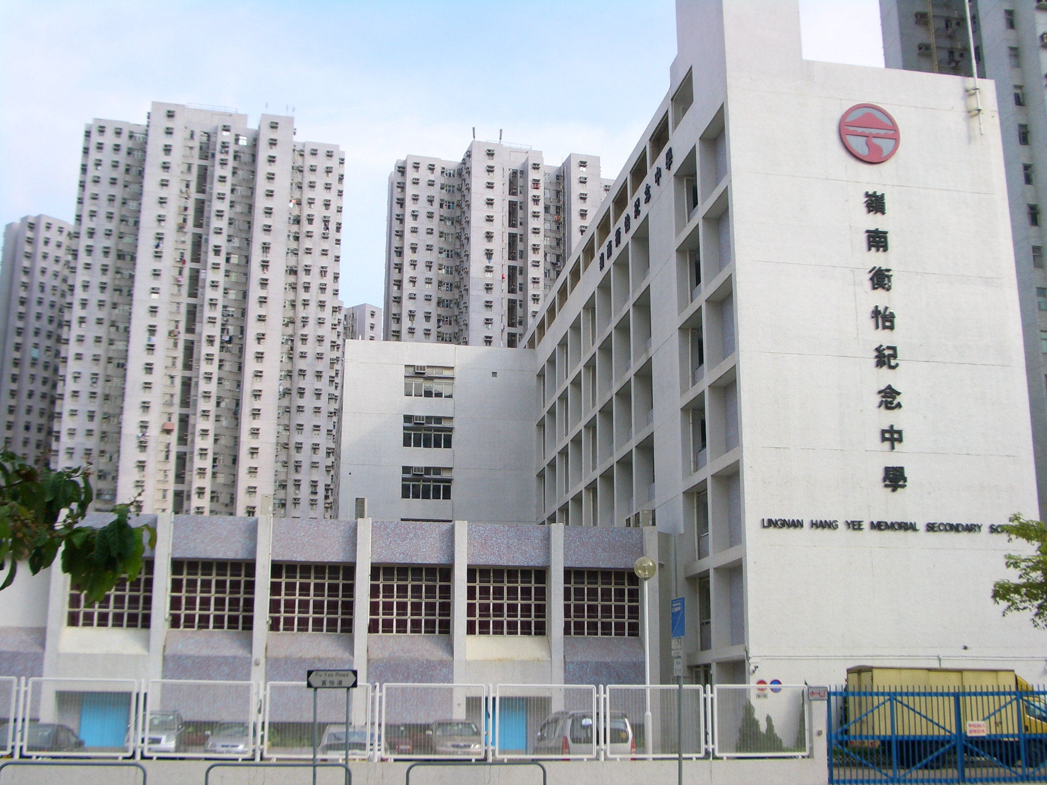 中文（香港）: 嶺南衡怡紀念中學正門。